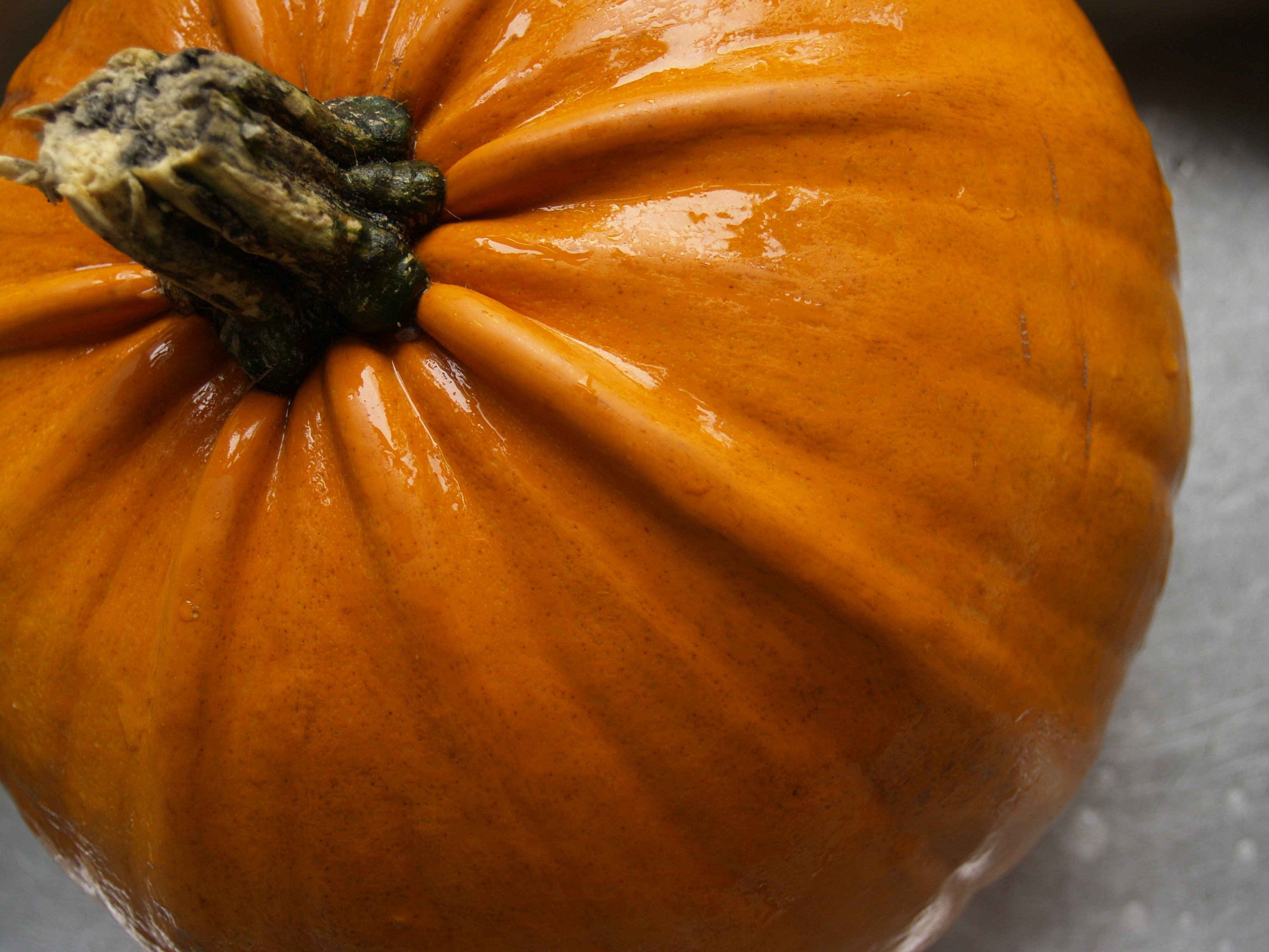 Græskar